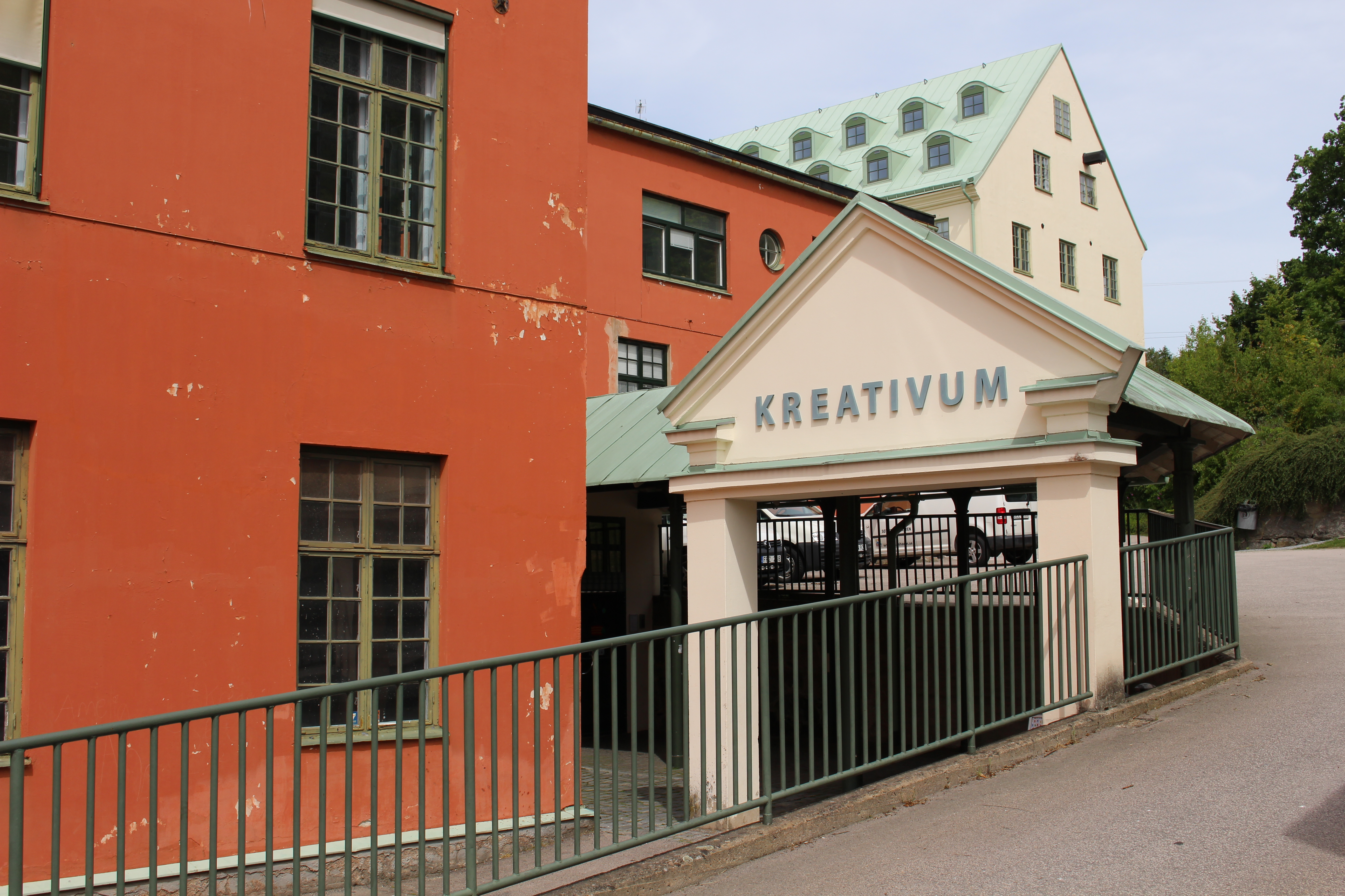 Entré till Kreativum